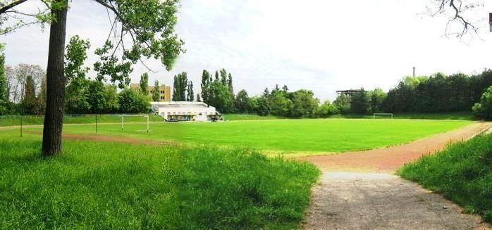 Футболният стадион на град Попово, намиращ се в Градската градина - 13.05.2008 год. Фото: Вл. Стойков